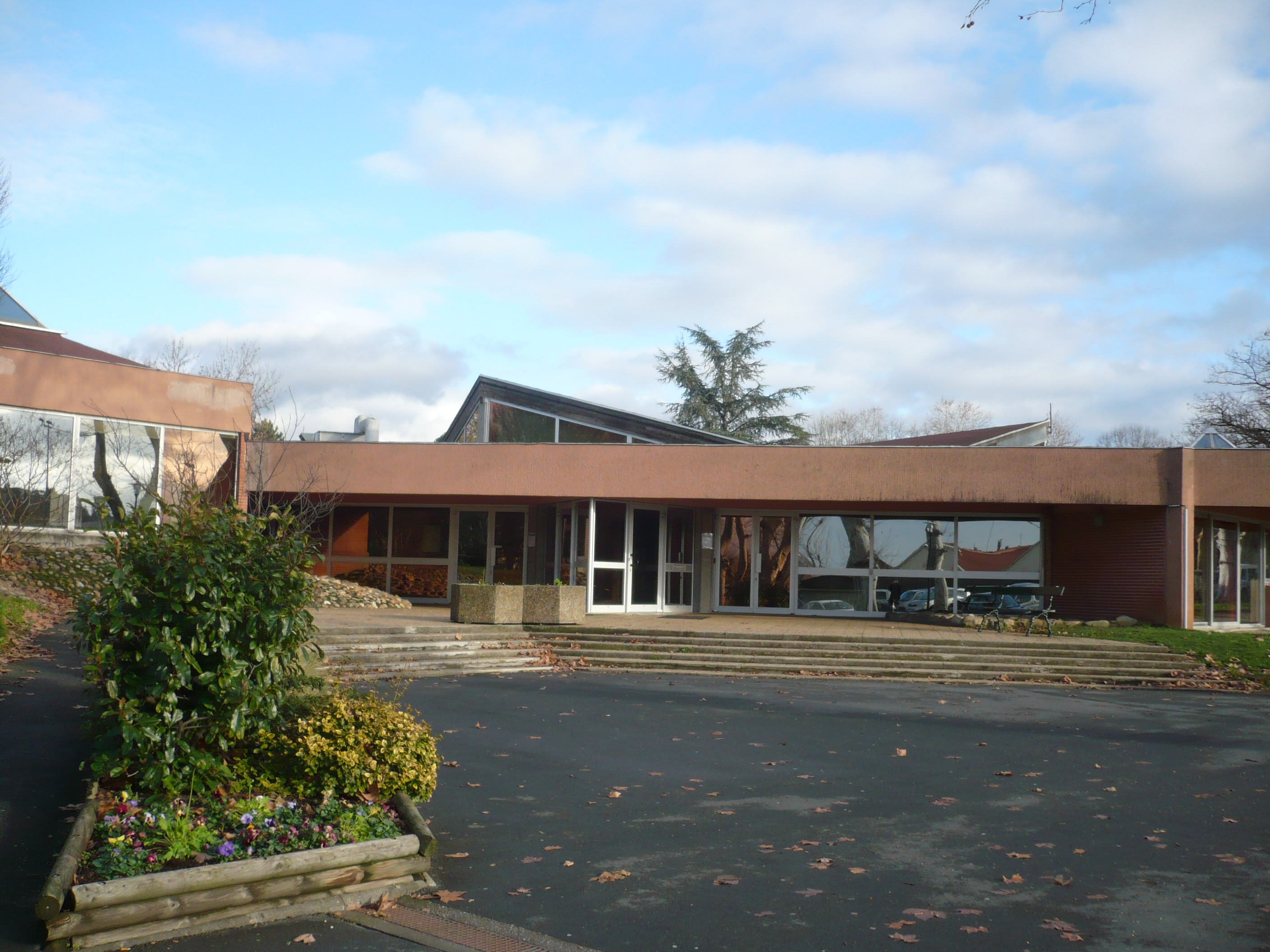 Entrée Bibliothèque et Archives Municipales à Castres dans le département français du Tarn.